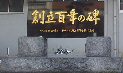 100周年記念の碑